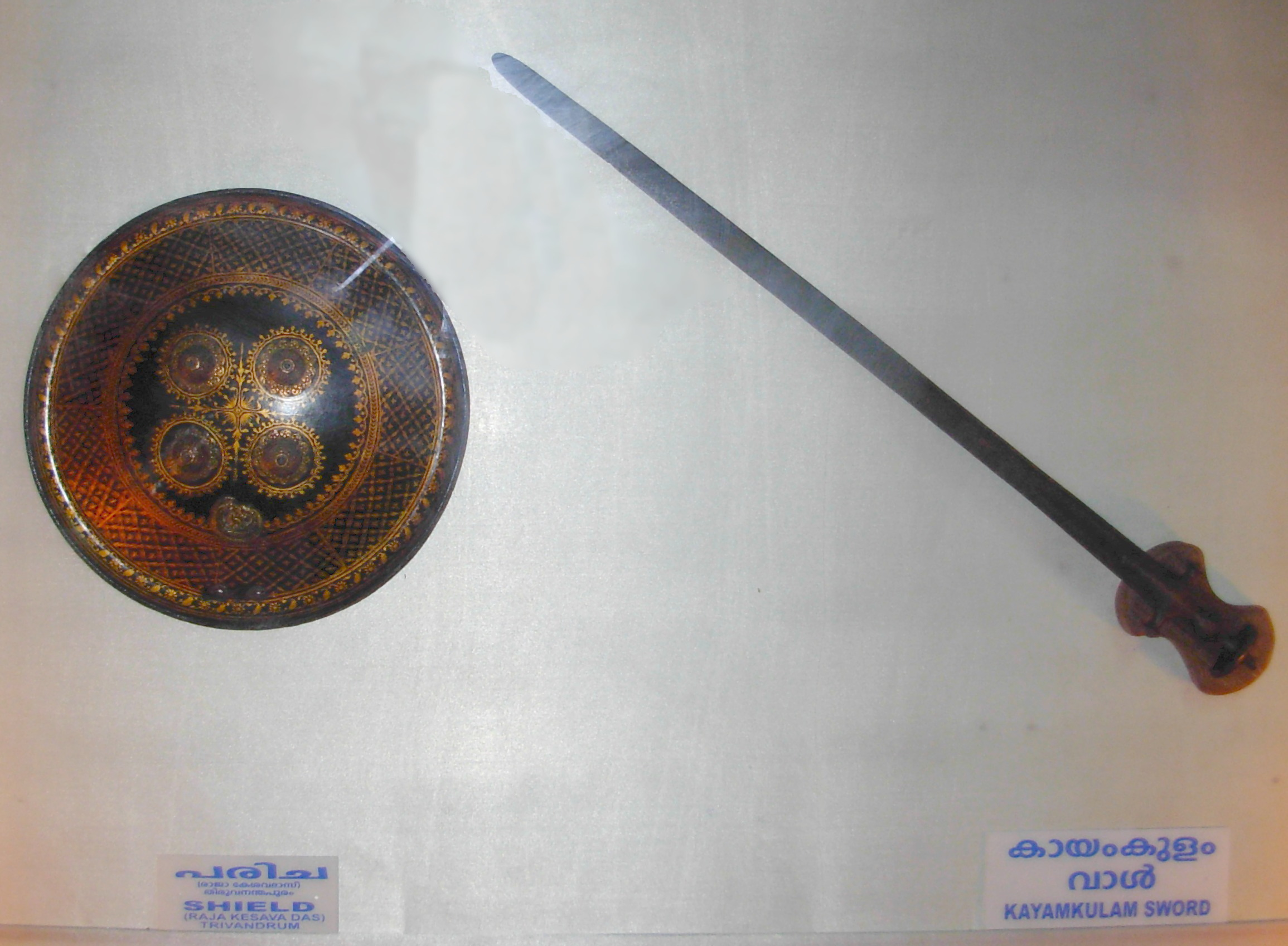 ഇരുതലയും മൂർച്ചയുള്ള പ്രസിദ്ധമായ കായംകുളം വാൾ. കായംകുളത്തെ കൃഷ്ണപുരം കൊട്ടാരത്തിൽ സൂക്ഷിച്ചിരിക്കുന്നു.